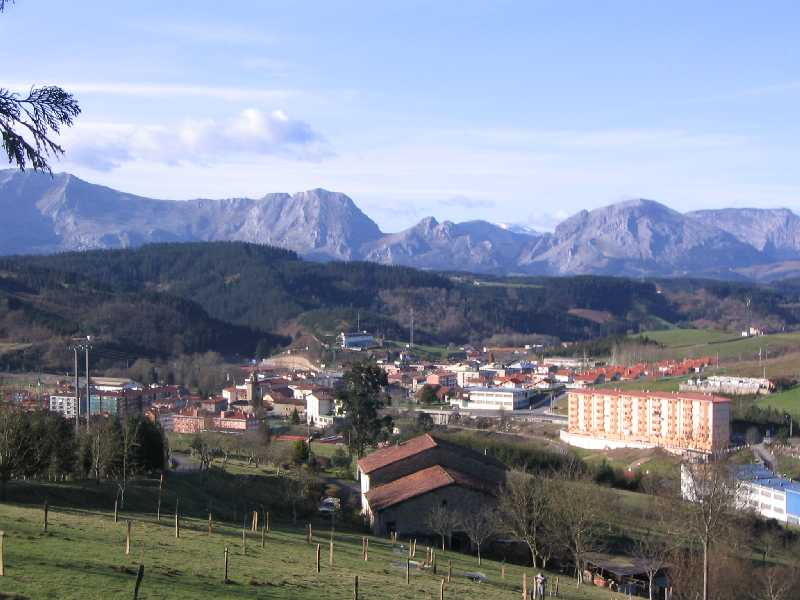 Vista de Zaldívar, Vizcaya, País Vaco, España Al fondo la sierra de Anboto.